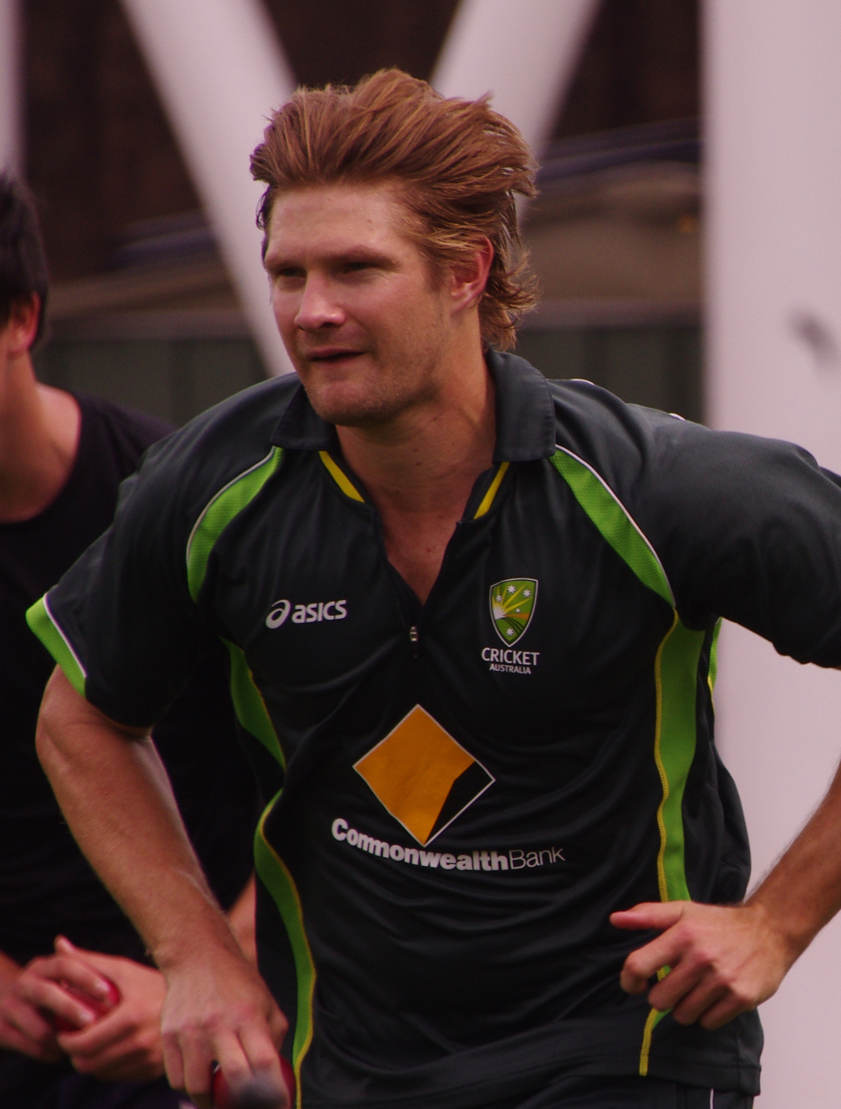 SHANE WATSON